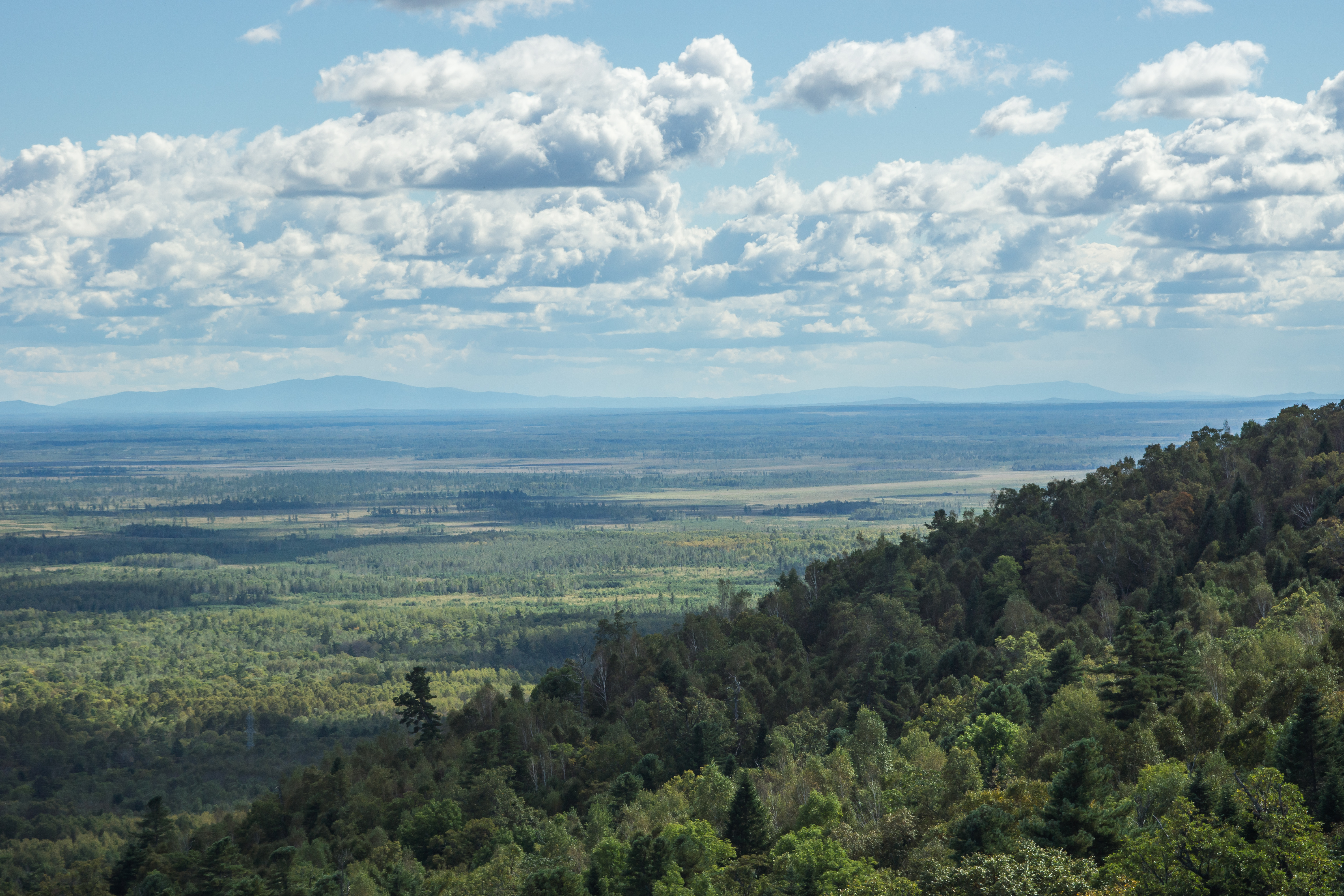 Хехцирский заказник: Хабаровский район, Хабаровский край This image is related to the protected area of Russia number 2700328